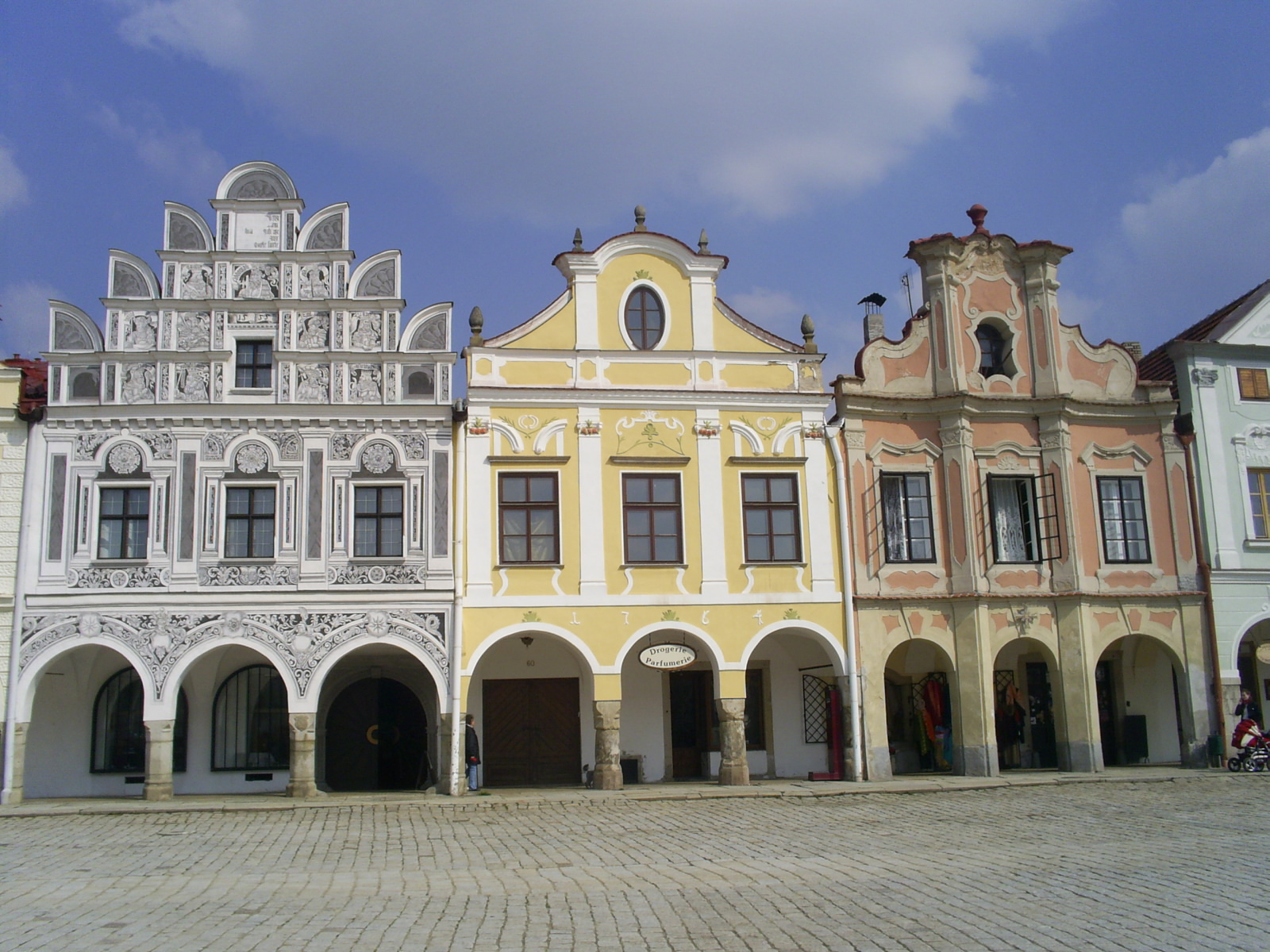 Houses in Telč (Telč-Czech Republic - domy čp. (zleva) 62, 61, 60 - kulturní památky).